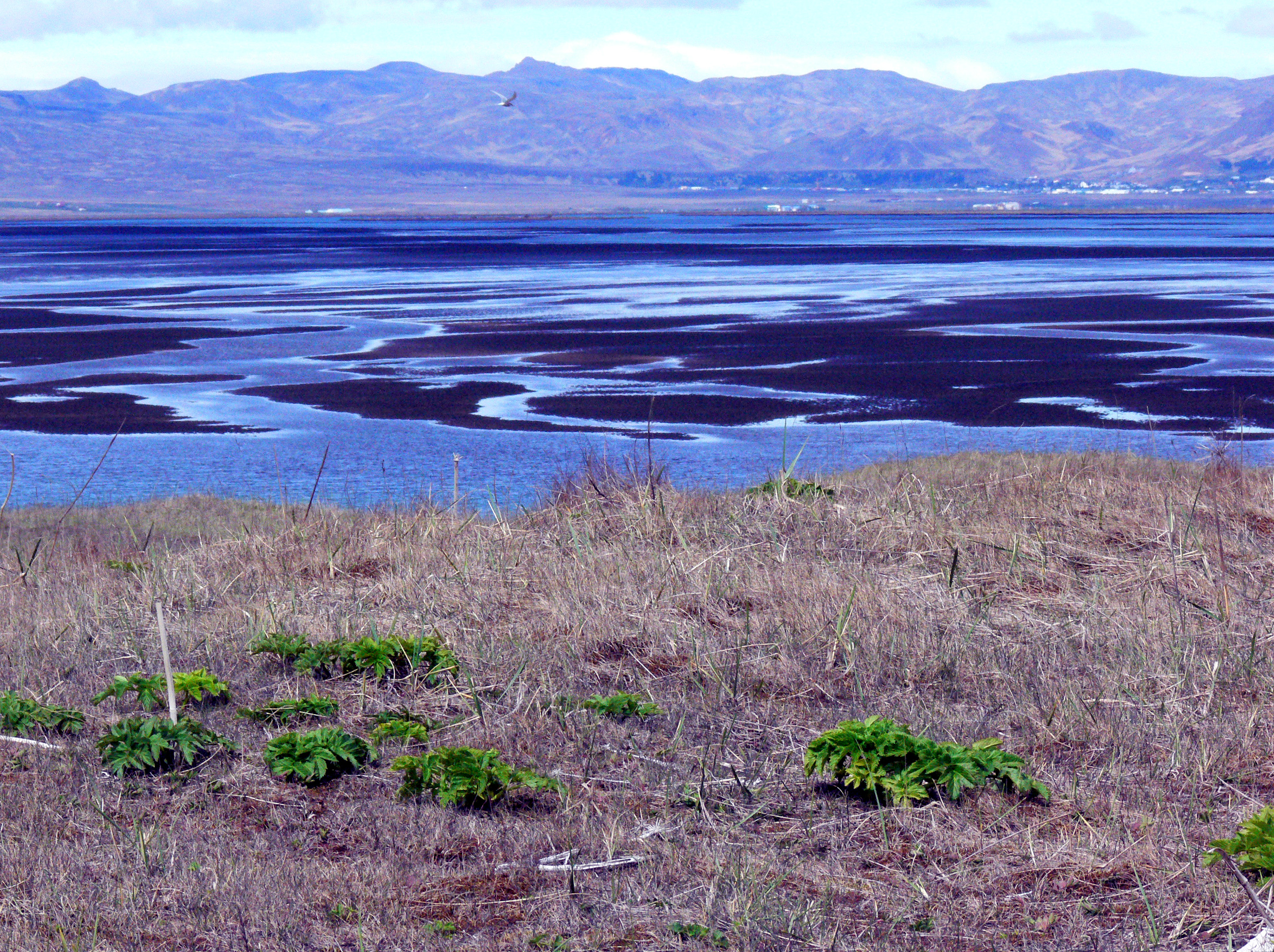 Ölfusá nach Heragerði